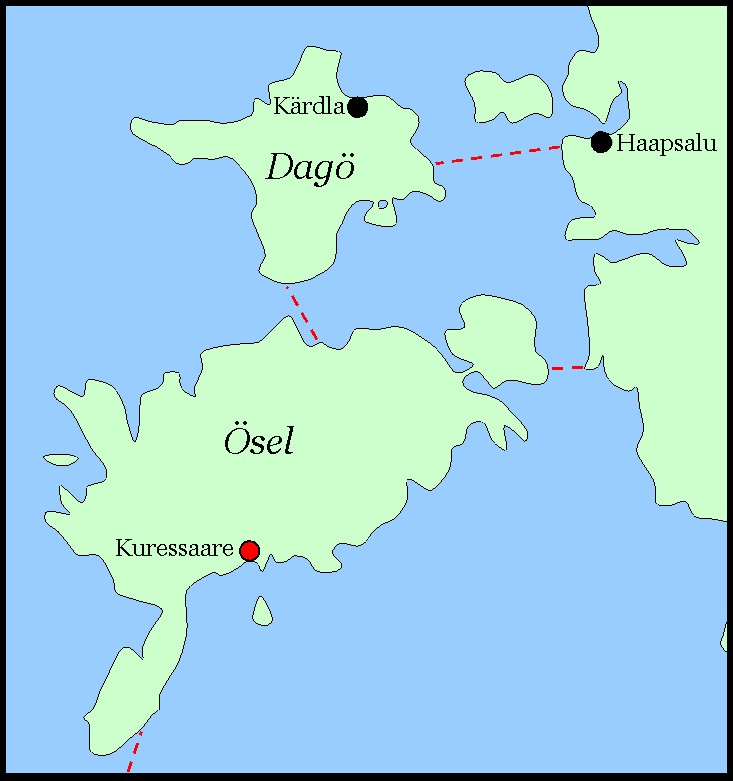 Kuressaare terletak di bagian selatan Pulau Saaremaa.